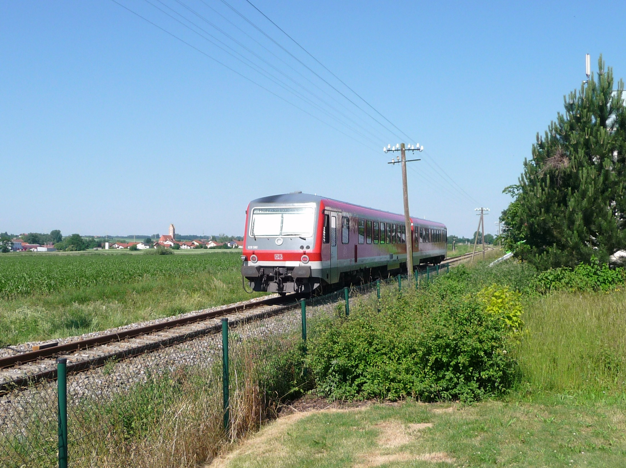 Die Rottalbahn in der Nähe von Oberdietfurt